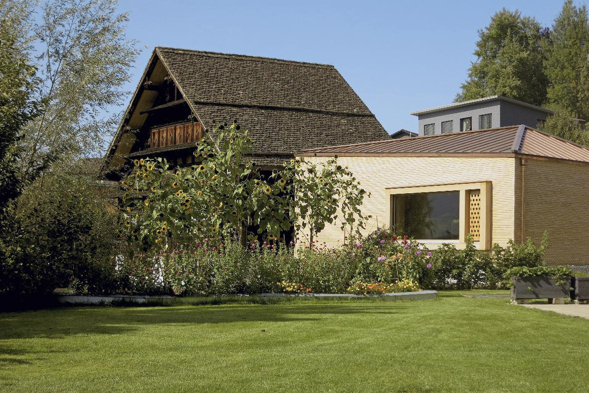 Anbau Ackerhus Ebnat-Kappel